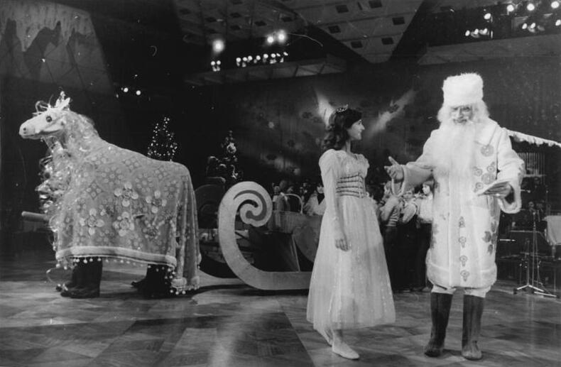 ADN-ZB Senft 12.12.76-St.-Berlin: Jolkafest im Palast der Republik- Väterchen Frost und Schneewittchen brachten mit dem Schlitten die Geschenke für die Gäste des Jolkafestes am 12.12.76 im Großen Saal des Palastes der Republik. Der Zentralvorstand der DSF und das Staatliche Komitee für Rundfunk der DDR boten den Gästen - verdiente Werktätige aus Berliner Betrieben, Mitarbeiter der Humboldt-Universität und sowjetische Spezialisten- ein vielseitiges Programm.